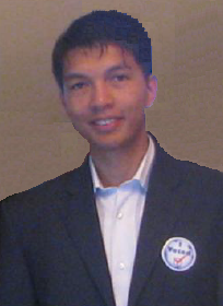 Andry Rajoelina à l'ambassade américaine de Madagascar, novembre 2008